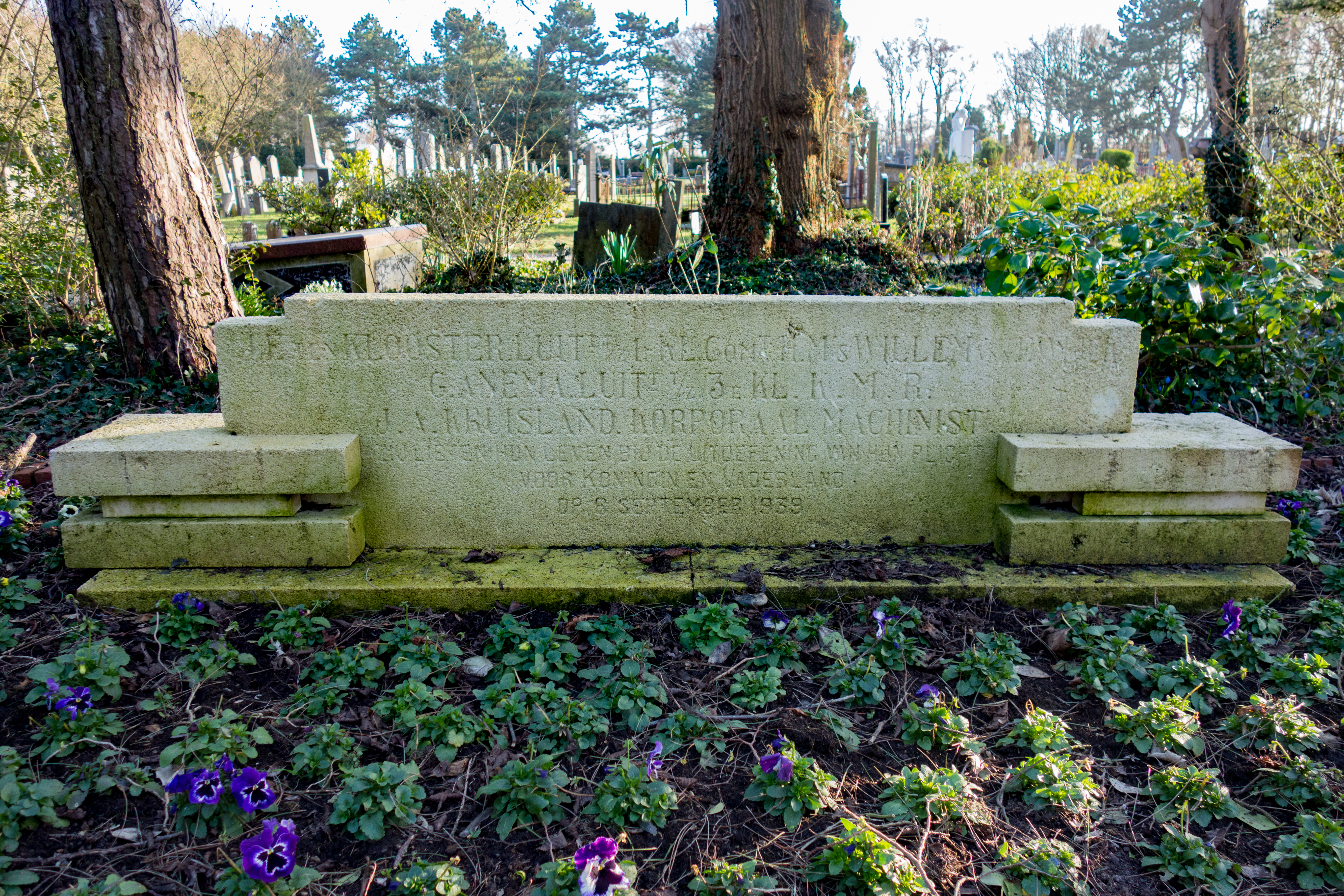 Grafmonument voor de omgekomen bemanning van de Hr.Ms. Willem van Ewijck.